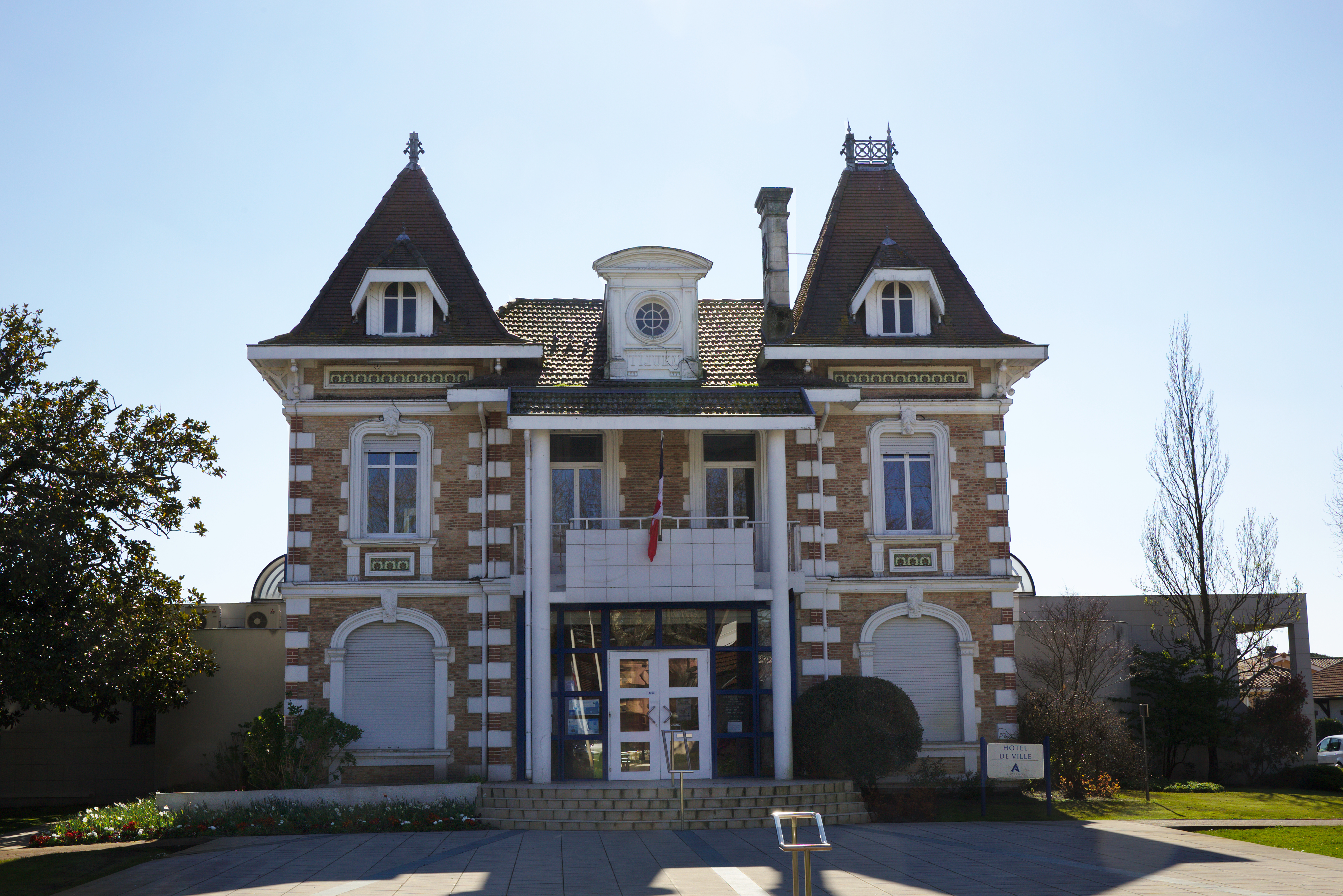 Mairie d'Andernos (Gironde, France).